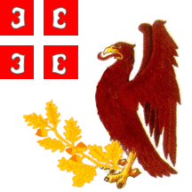 Flag of Kragujevac